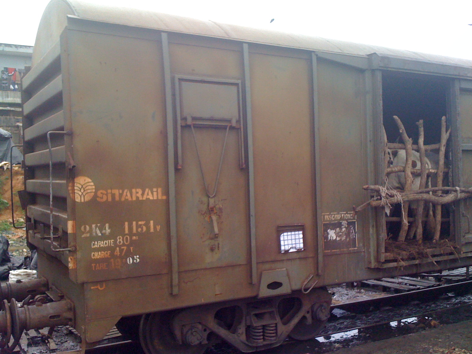 Wagon de bétail de la STIB (ex-sitarail), Côte d'Ivoire, Burkina Faso